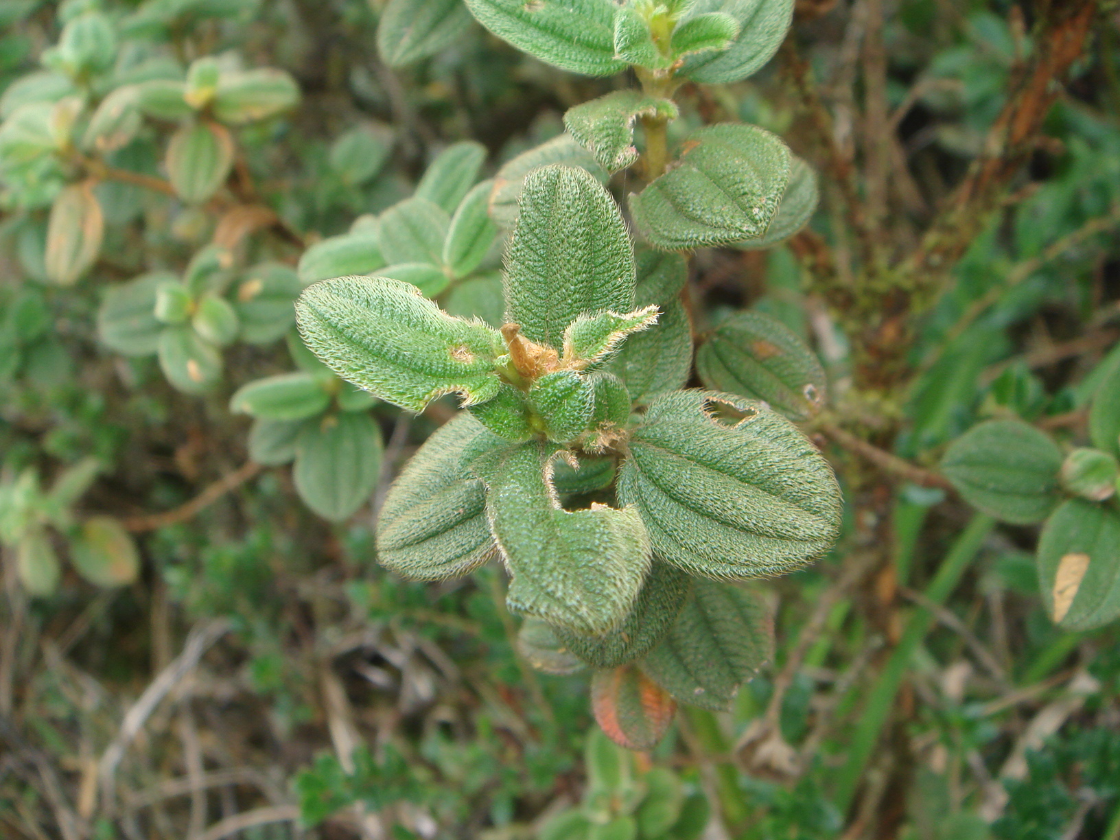 Sietecueros (Tibouchina grossa) Páramo de Guasca, Cundinamarca, Colombia.